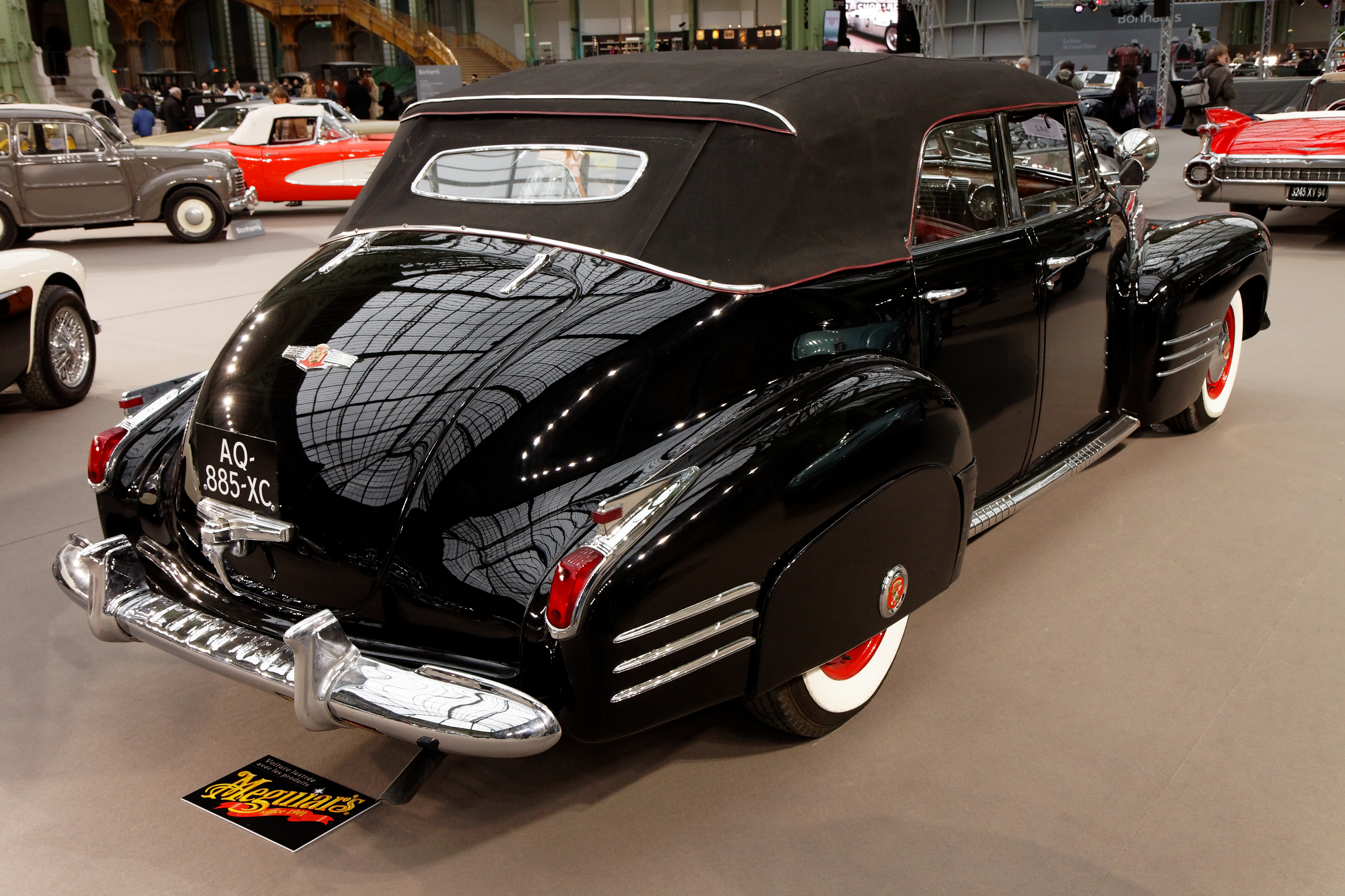 Cadillac Series 62 Convertible